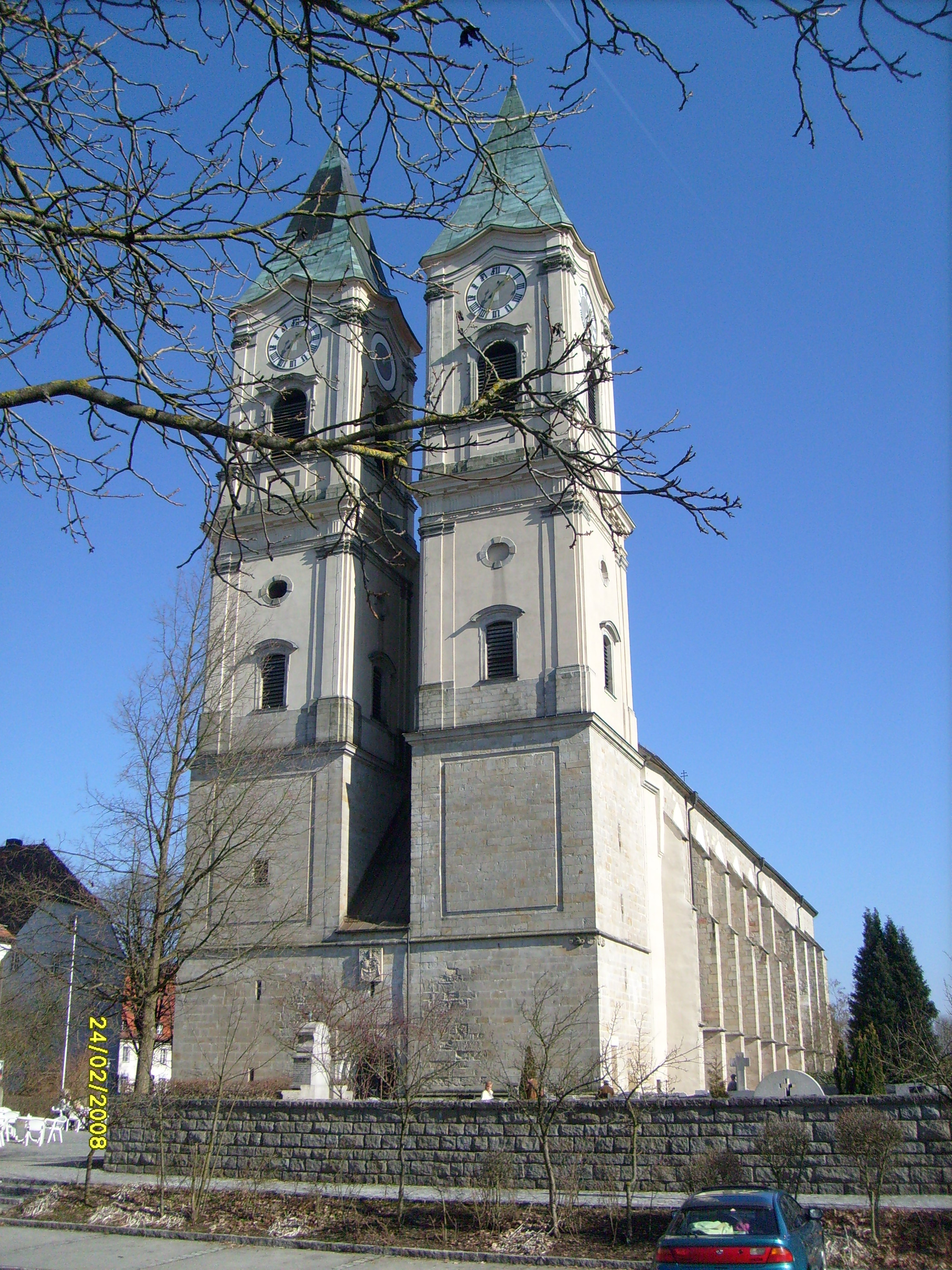 Die Basilika in Niederalteich (Niederbayern).